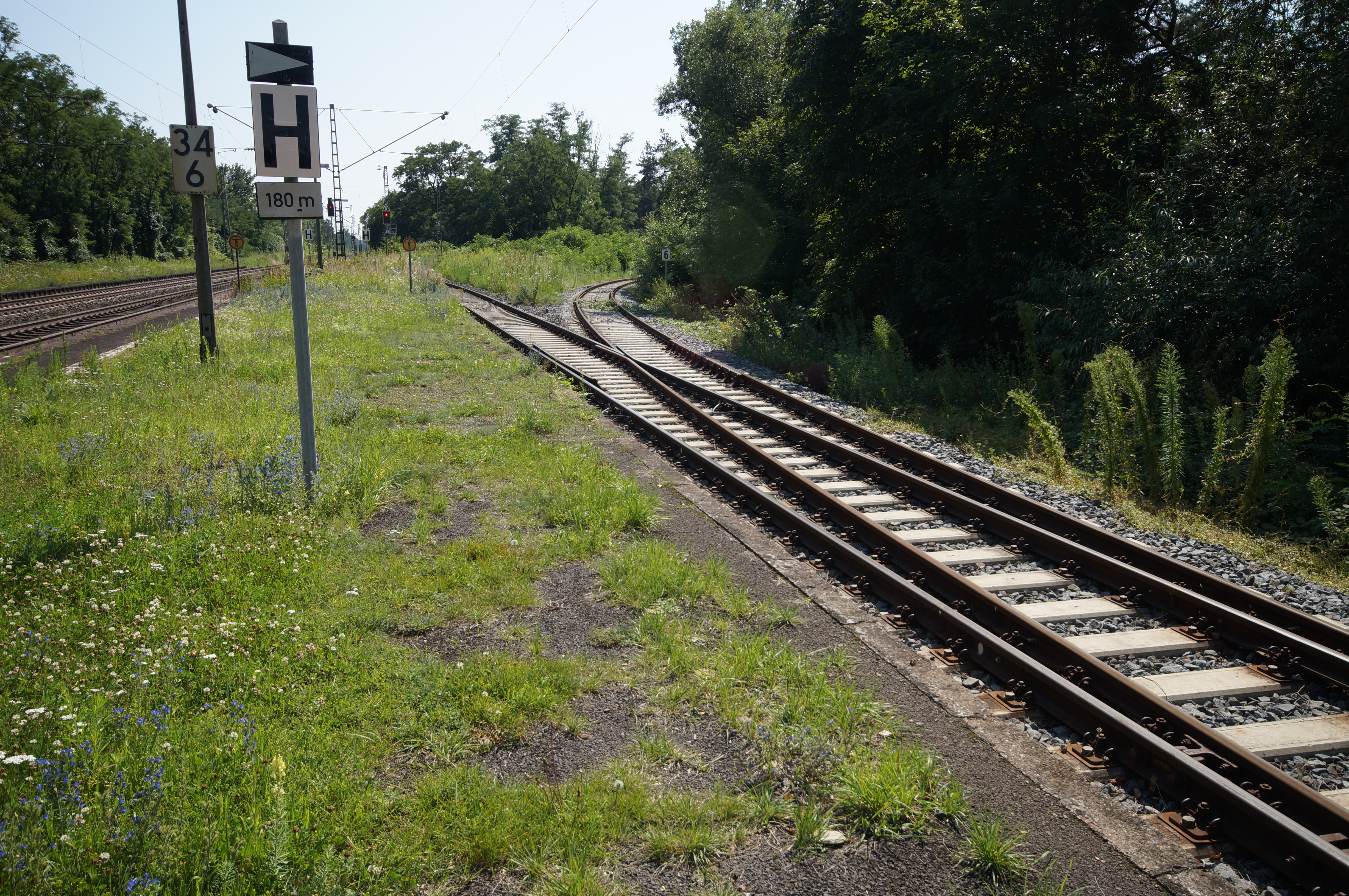 Das Gleis der Pfungstadtbahn, das vom Darmstadt-Eberstadter Bahnhof nach Pfungstadt abzweigt